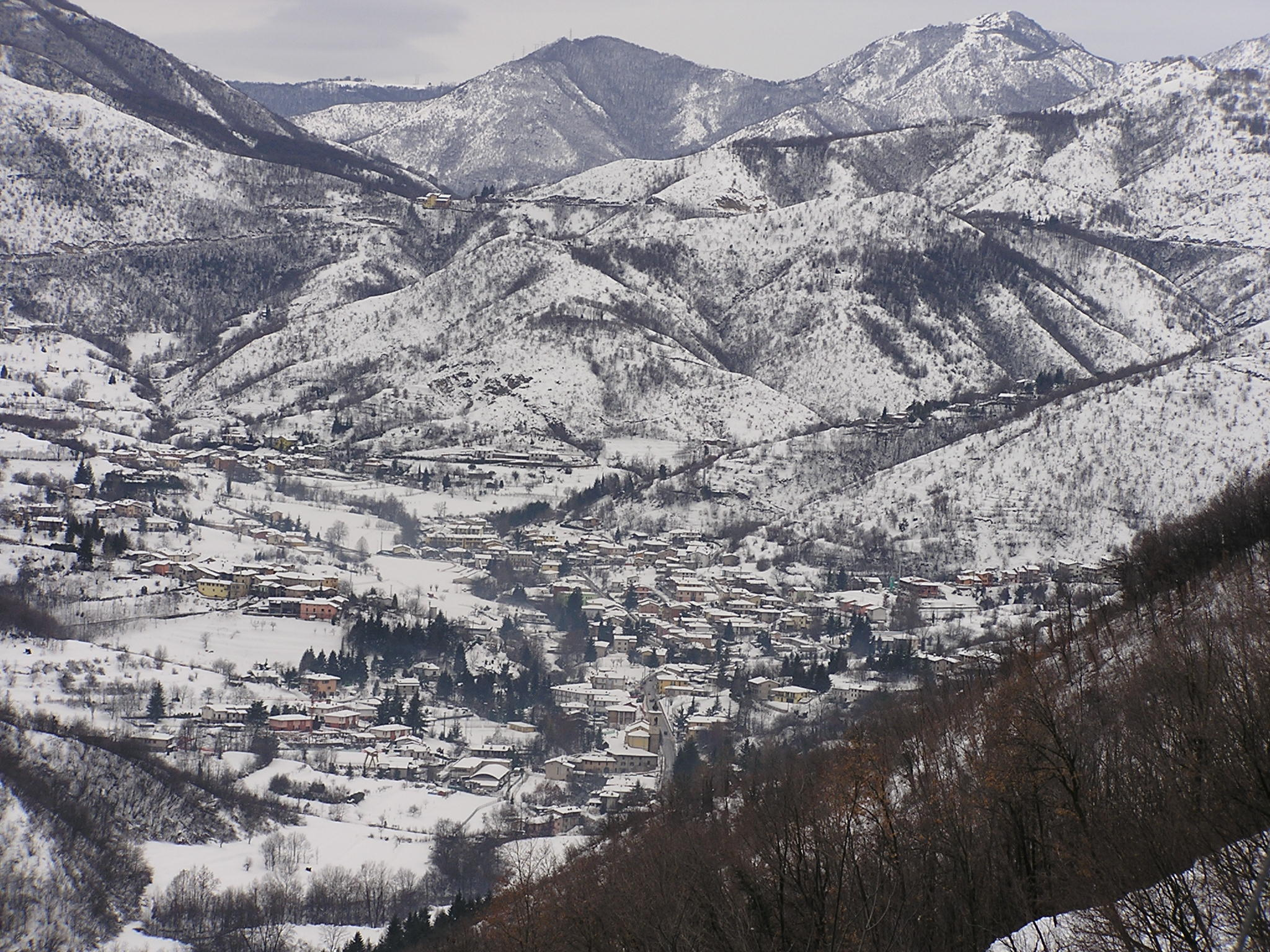 Paese di Vallio con la neve